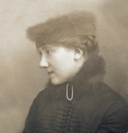 Adina, soţia lui Take Ionescu (născută Olmazu, fostă Cordescu viitoare Woroniecki. Fotografie din anul 1920, România, la vârsta de 29 de ani)